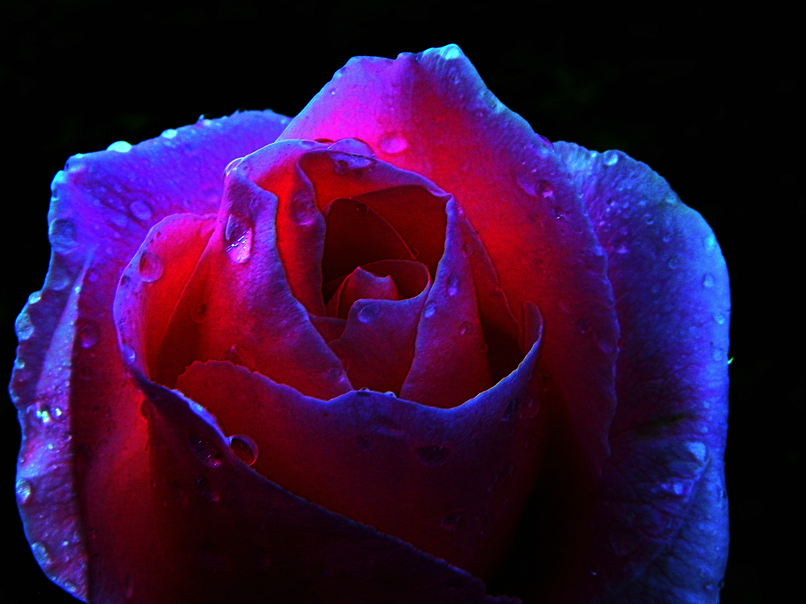 Rosa. Galiza